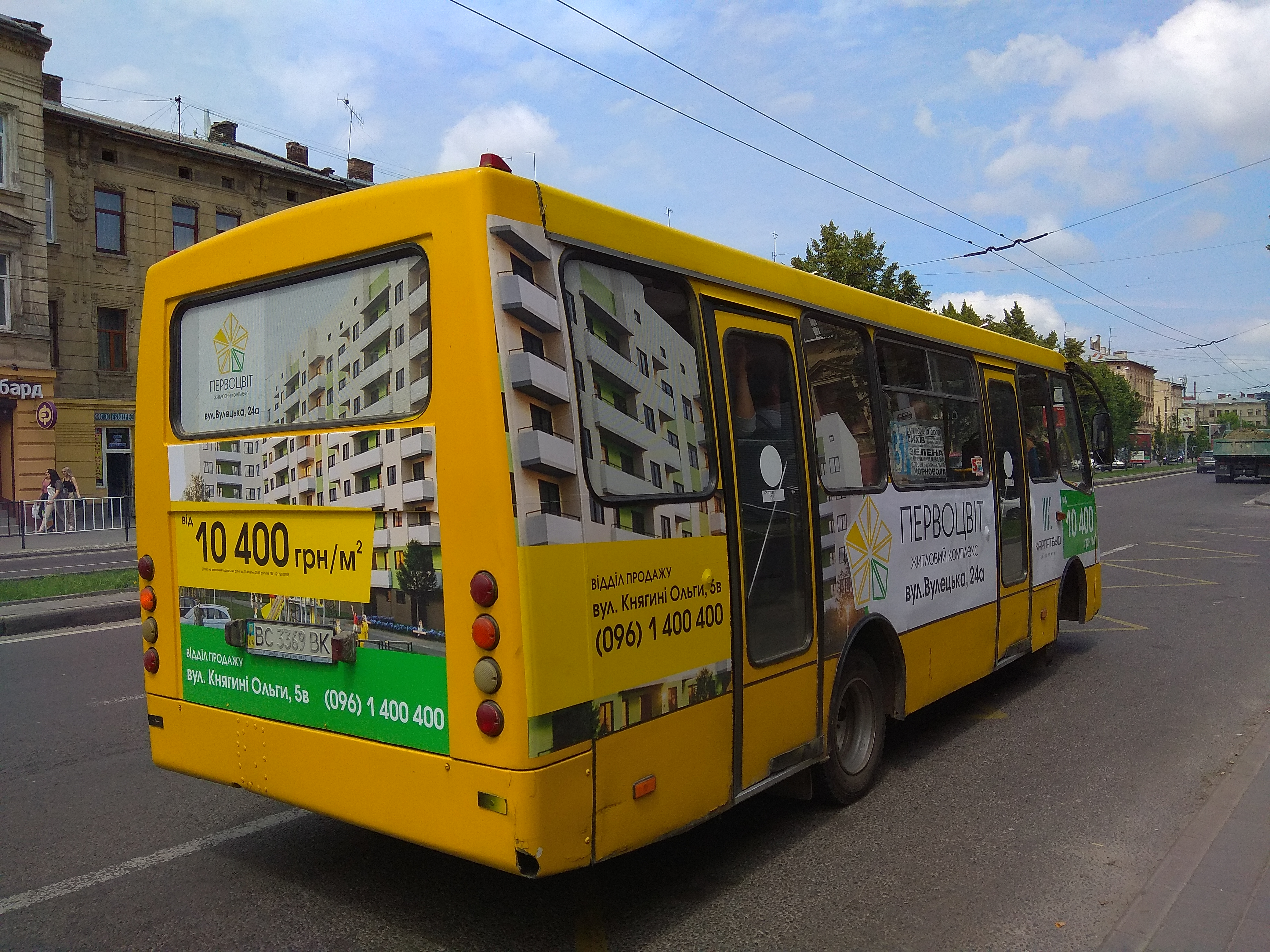 Реклама на задньому склі